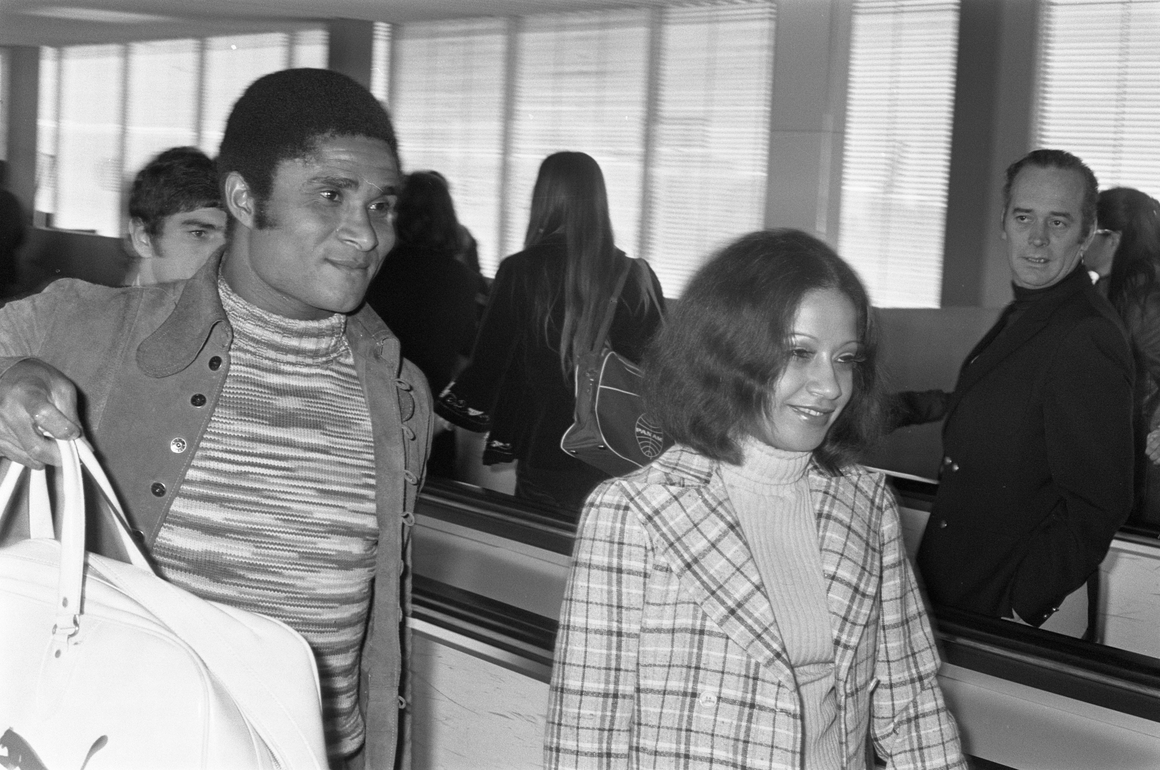 Collectie / Archief : Fotocollectie Anefo Reportage / Serie : [ onbekend ] Beschrijving : Aankomst Benfica op Schiphol, Eusebio Annotatie : Naast hem zijn echtgenote Flora Bruheim ? Datum : 3 april 1972 Locatie : Noord-Holland, Schiphol Trefwoorden : sport, voetballers Persoonsnaam : Eusebio Instellingsnaam : Benfica Fotograaf : Punt, […] / Anefo Auteursrechthebbende : Nationaal Archief Materiaalsoort : Negatief (zwart/wit) Nummer archiefinventaris : bekijk toegang 2.24.01.05 Bestanddeelnummer : 925-5028